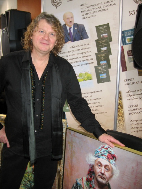 Белорусский художник Андрей Смоляк (на XVIII Минской международной книжный ярмарке-выстаке)